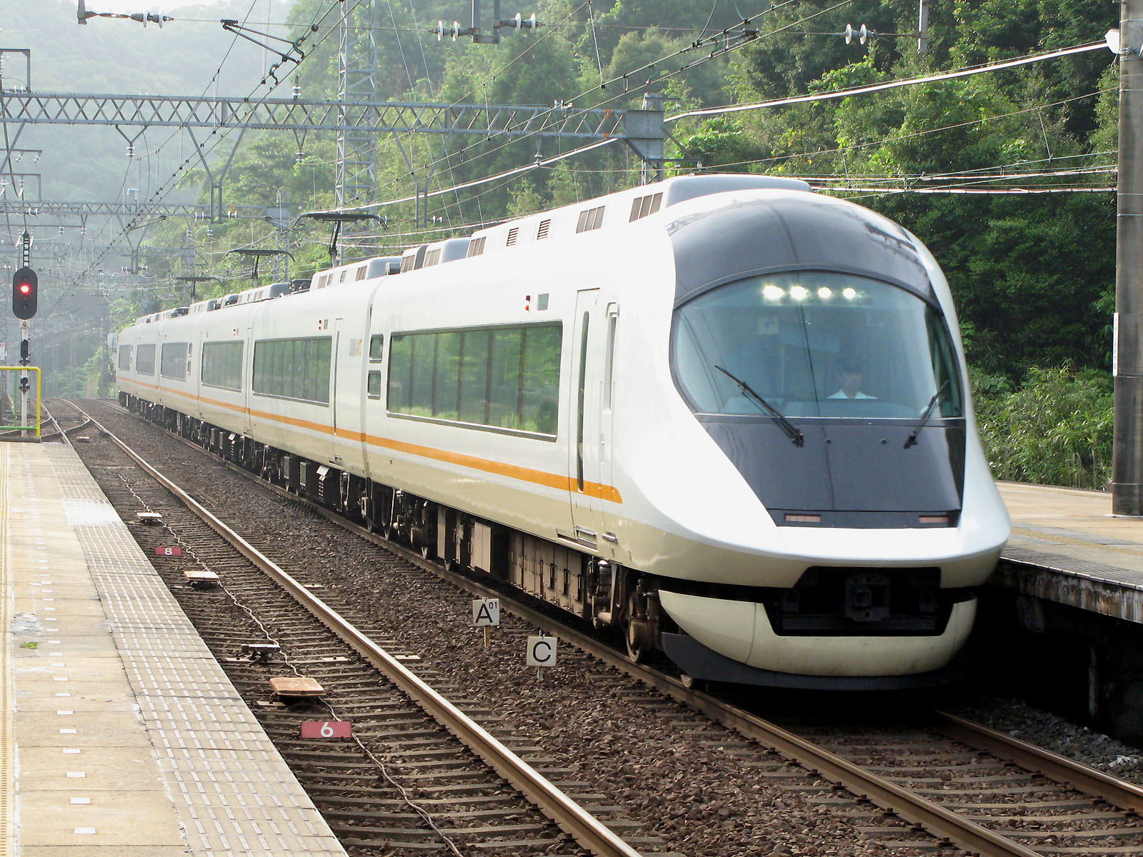 Kintetsu type 21020 近鉄21020系電車